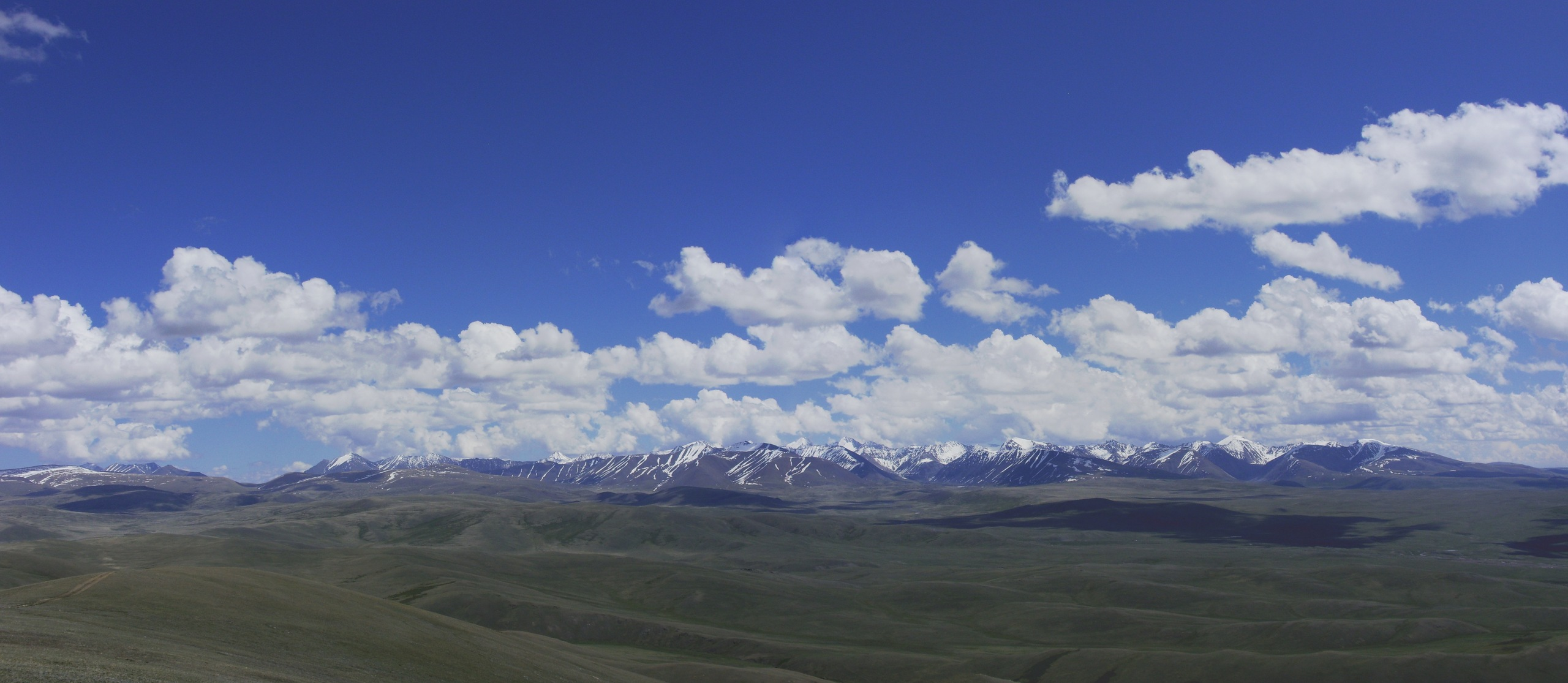 Хребет Чихачёва в Республике Алтай